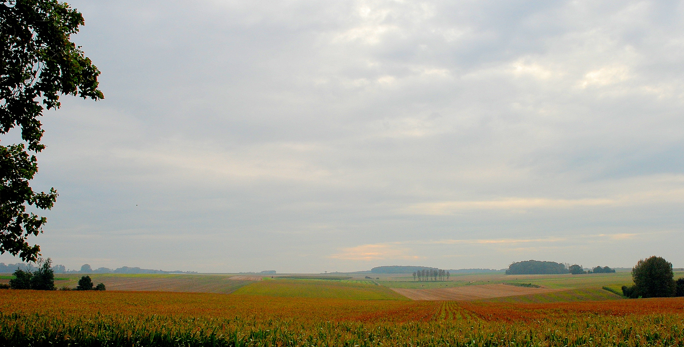 Vue sur Gapennes, Picardie, France